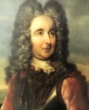 Ritratto di Annibale Maffei